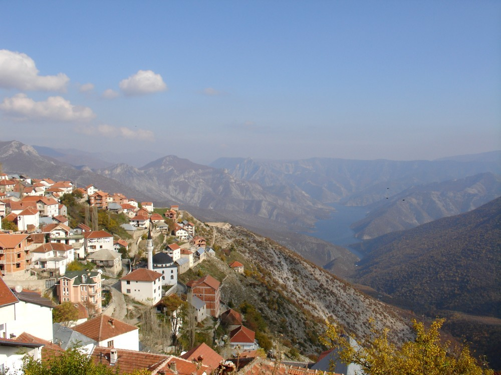 Gurgurnica